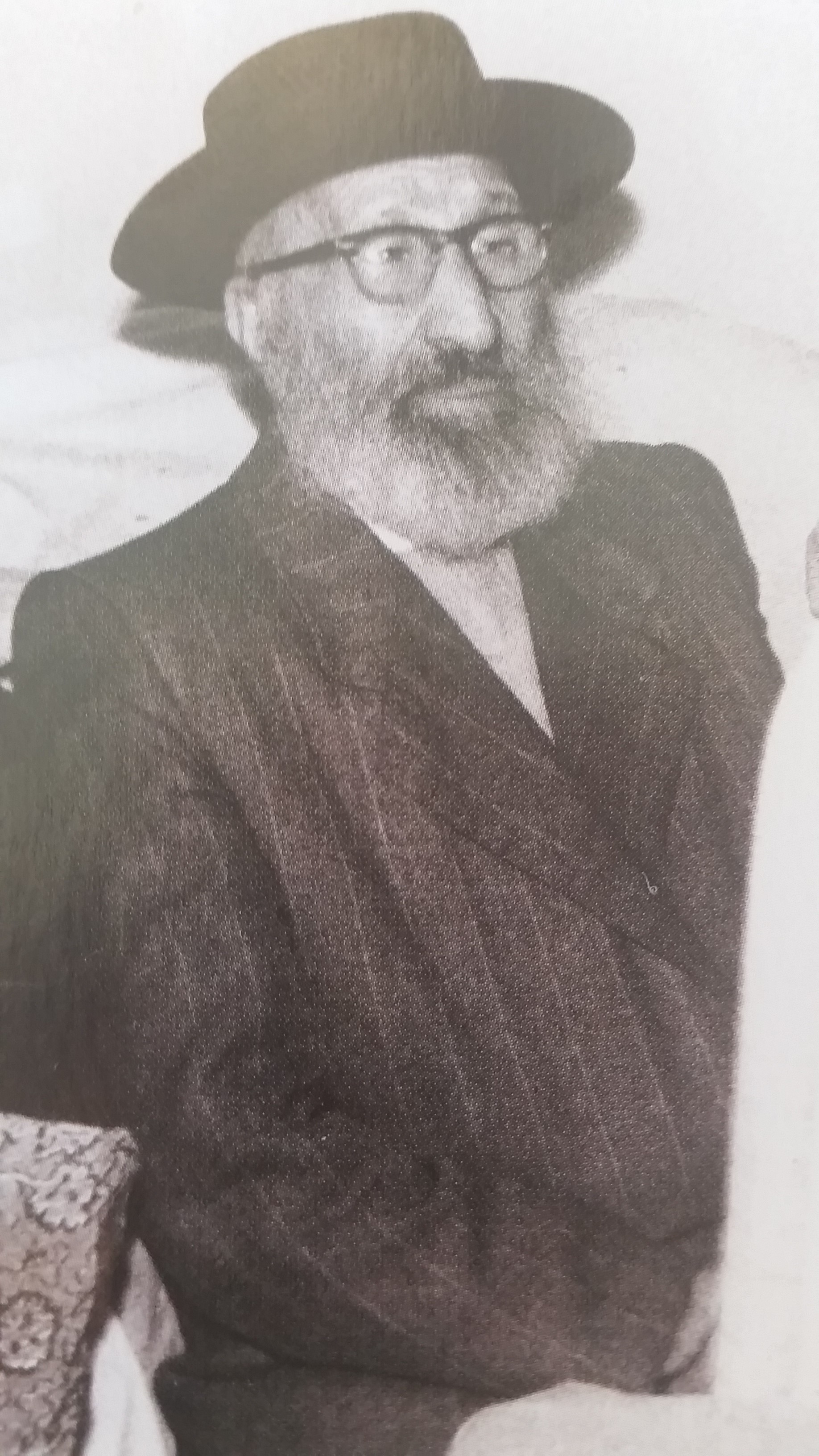 הרב נסים עזרא כדורי חזן